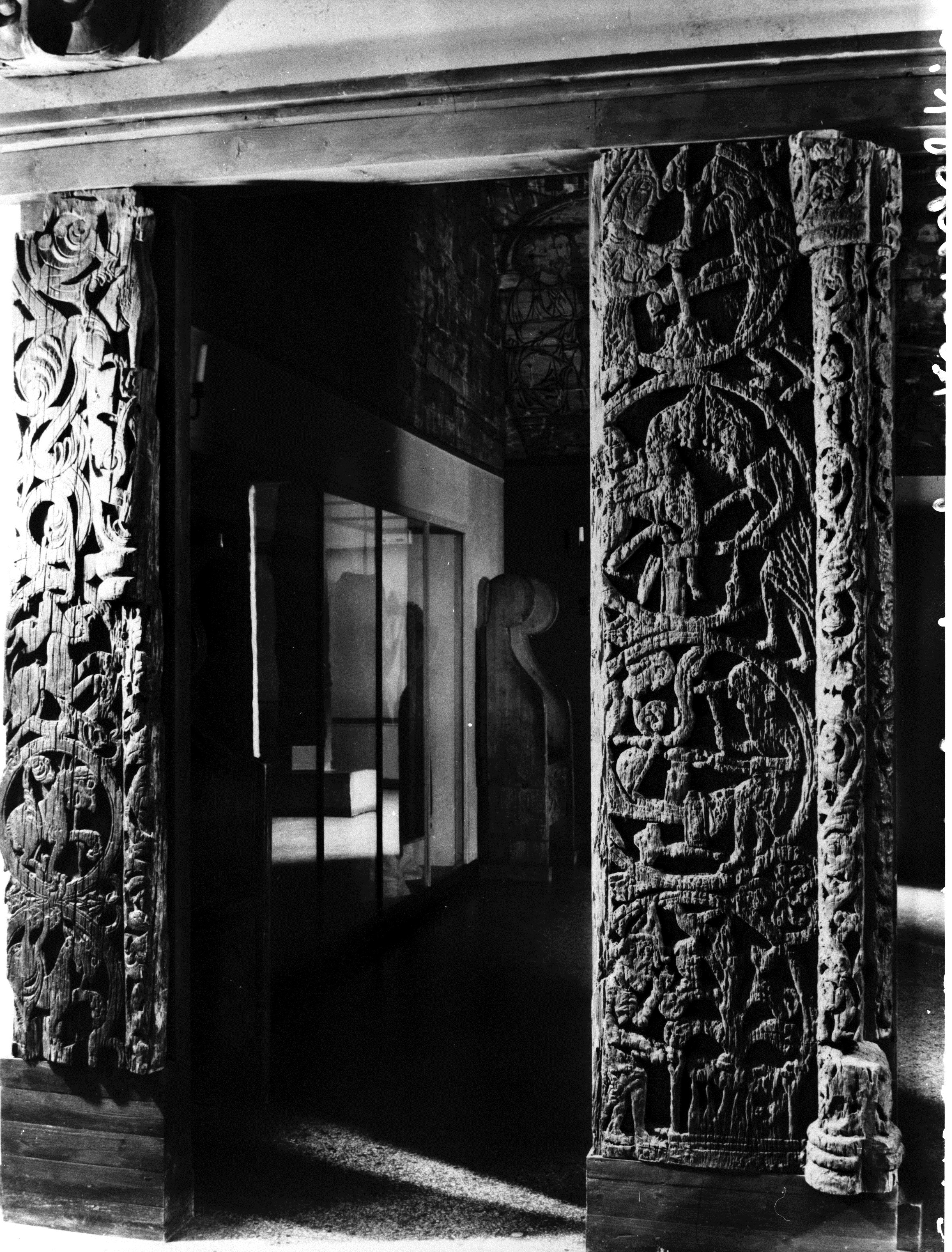 Portal fra Vegusdal stavkirke. Foto: Zodiaque/Kulturhistorisk museum. Fra Unimus (se også denne siden). Museumsnr. C4389.